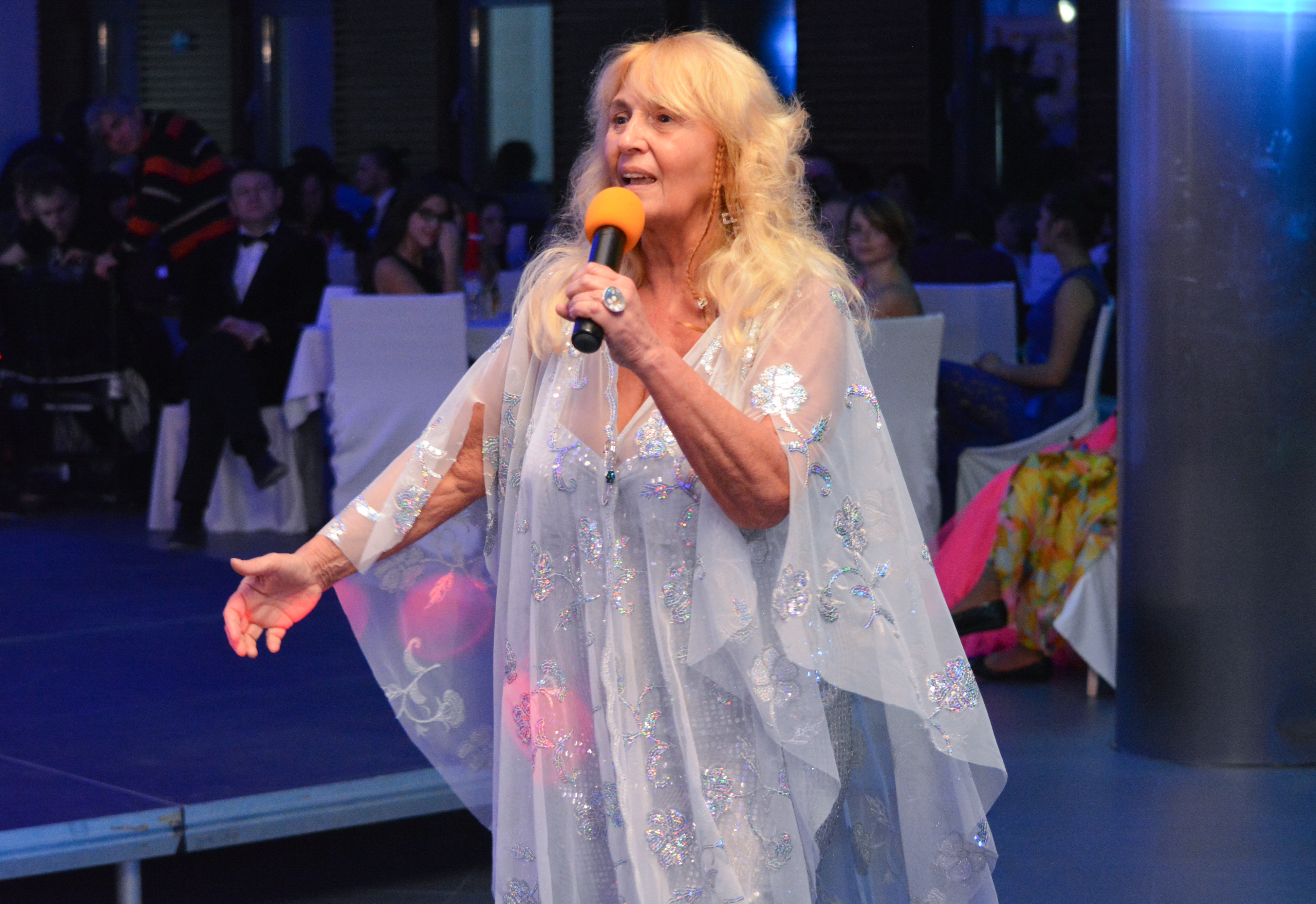 Болгарская певица Грета Ганчева на слёте академии Игоря Крутого в СОК Камчия